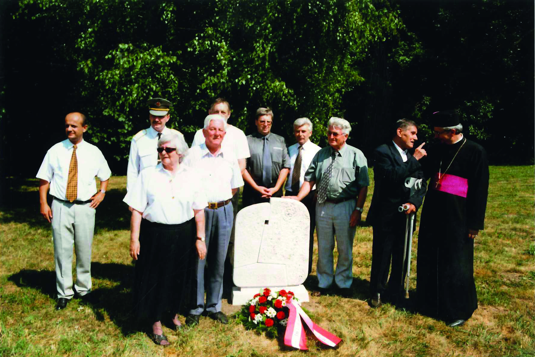 Lagerfriedhof des ehem. Kriegsgefangenenlagers Stalag XVII A Kaisersteinbruch, der "Slowaken"-Stein ist das Zentrum besonderen Gedenkens.